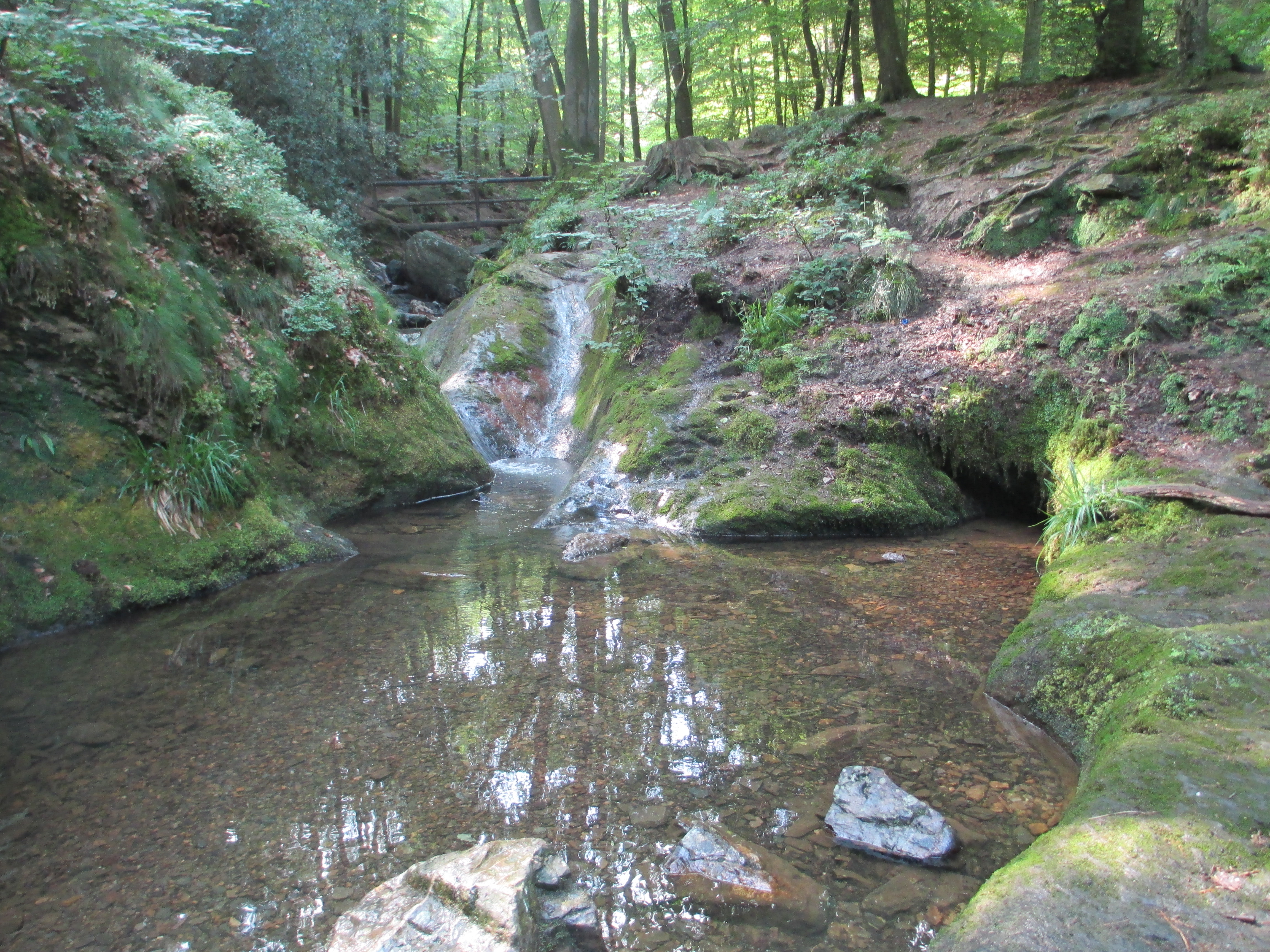 Le Ninglinspo (ici, en période de sécheresse) prend sa source à Vert-Buisson, sur la commune de Theux, et s'écoule vers Sedoz-Nonceveux (commune d’Aywaille).